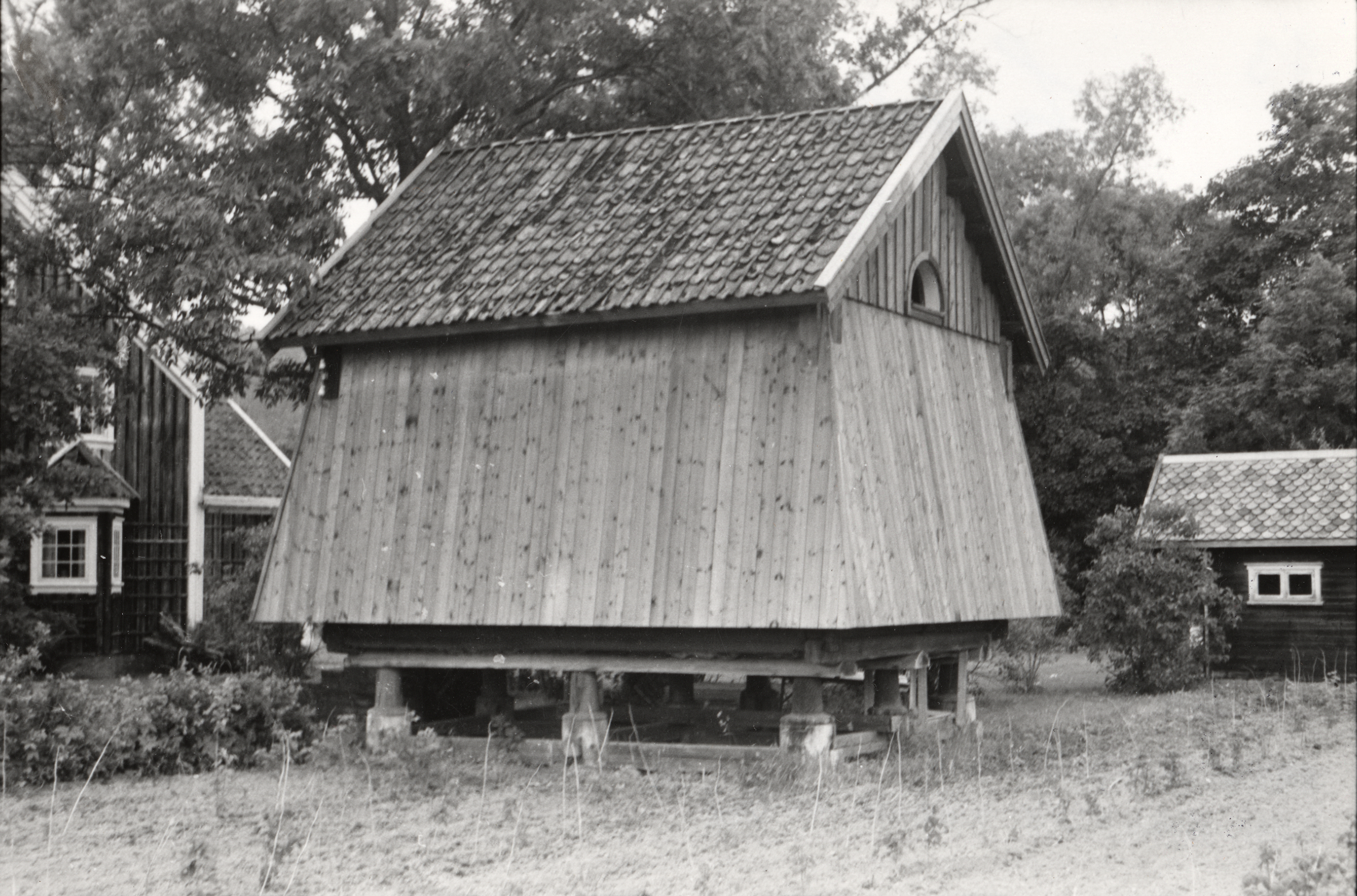 Valle i Sande, Vestfold Kåpekledd stabbur